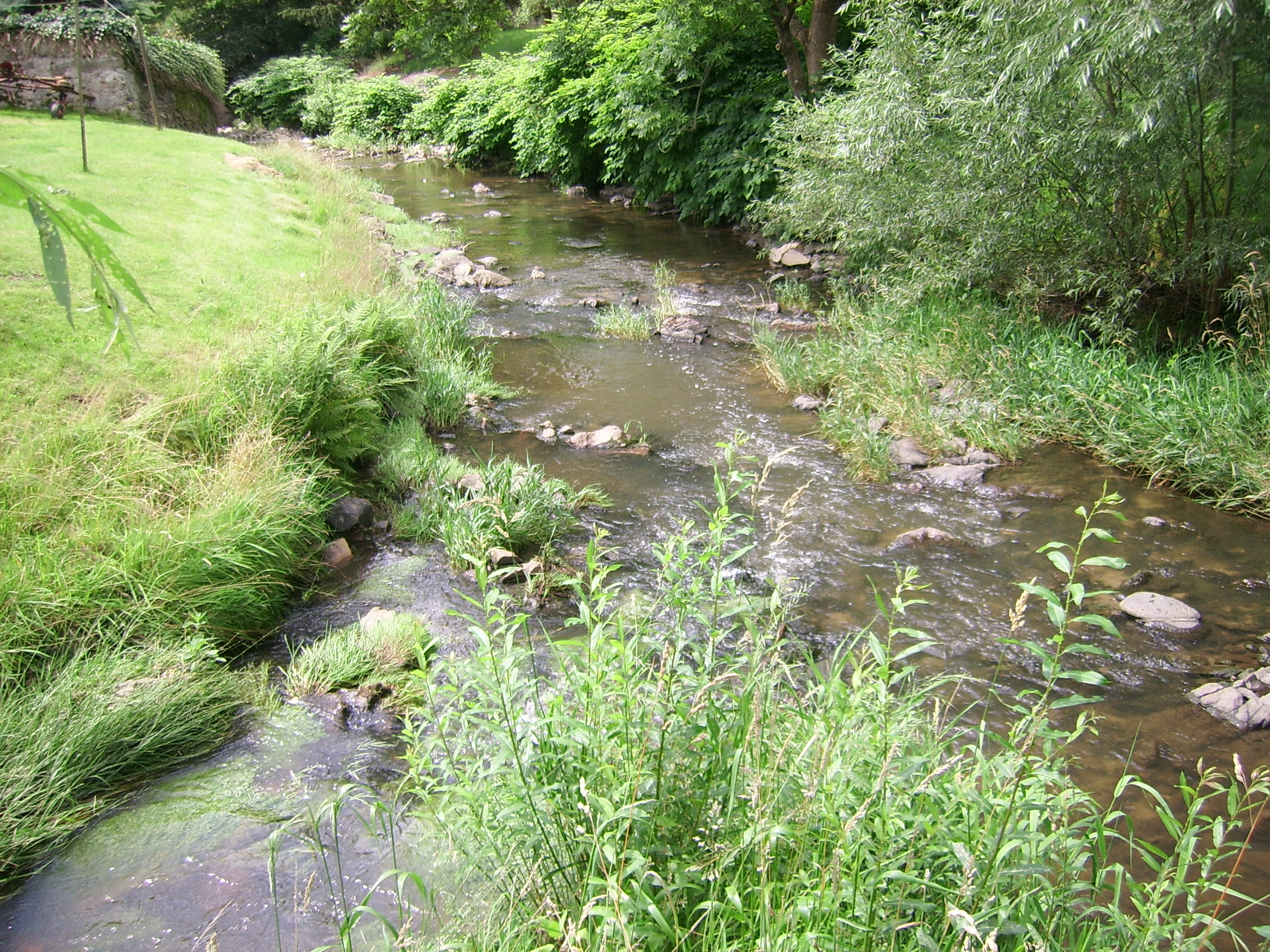 Die Mündung des Roten Grabens(li.) in die Große Röder in Grünberg